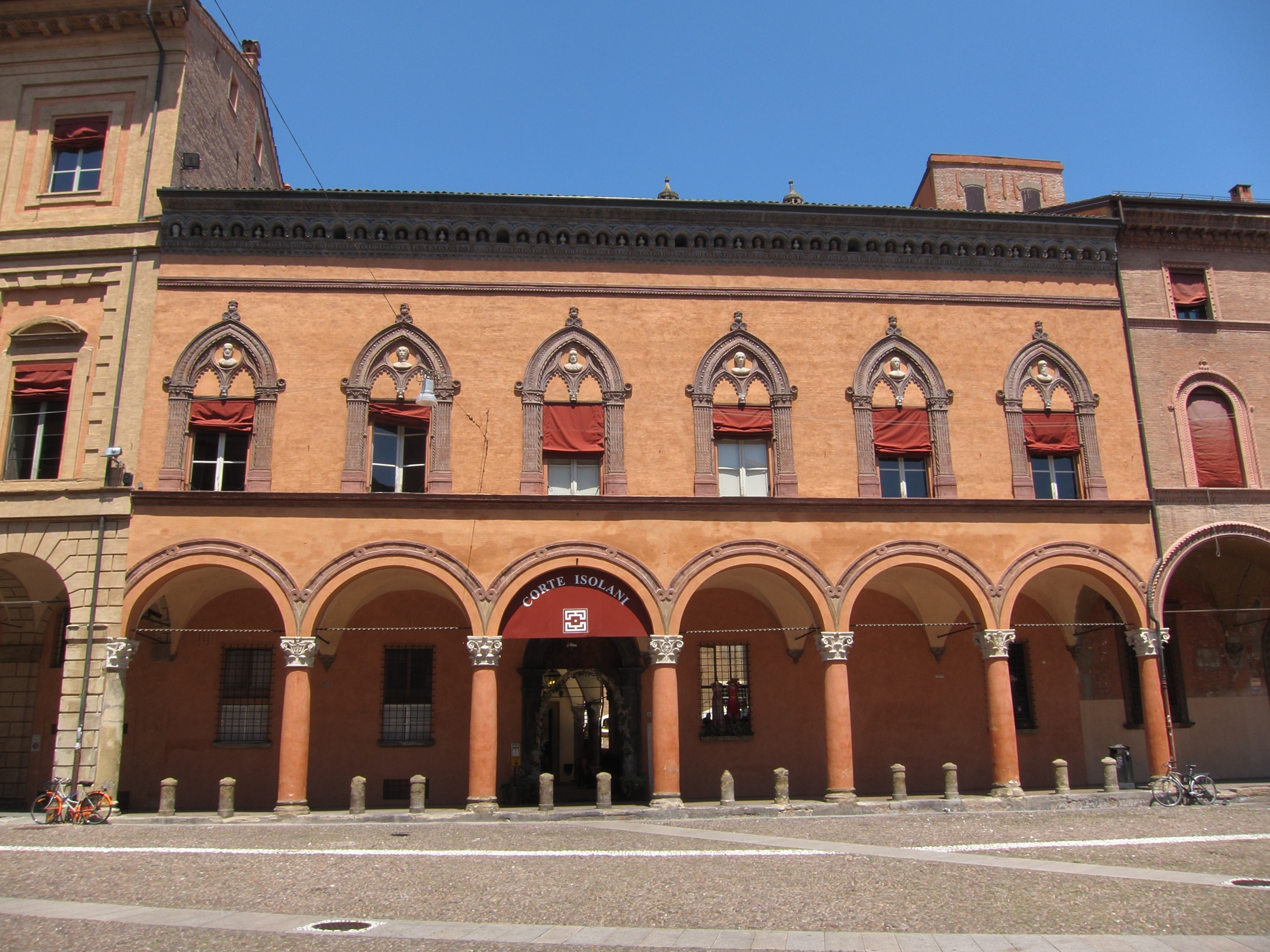 Palazzo Bolognini poi Isolani. Costruito tra il 1451 e il 1455 su progetto di Pagno Di Lapo Portigiani da Fiesole si presenta in forme tardogotiche con timidi accenni rinascimentali. La facciata é arricchita di decorazione a rilievo e teste di gusto antico. (Iscrizione della Città di Bologna)